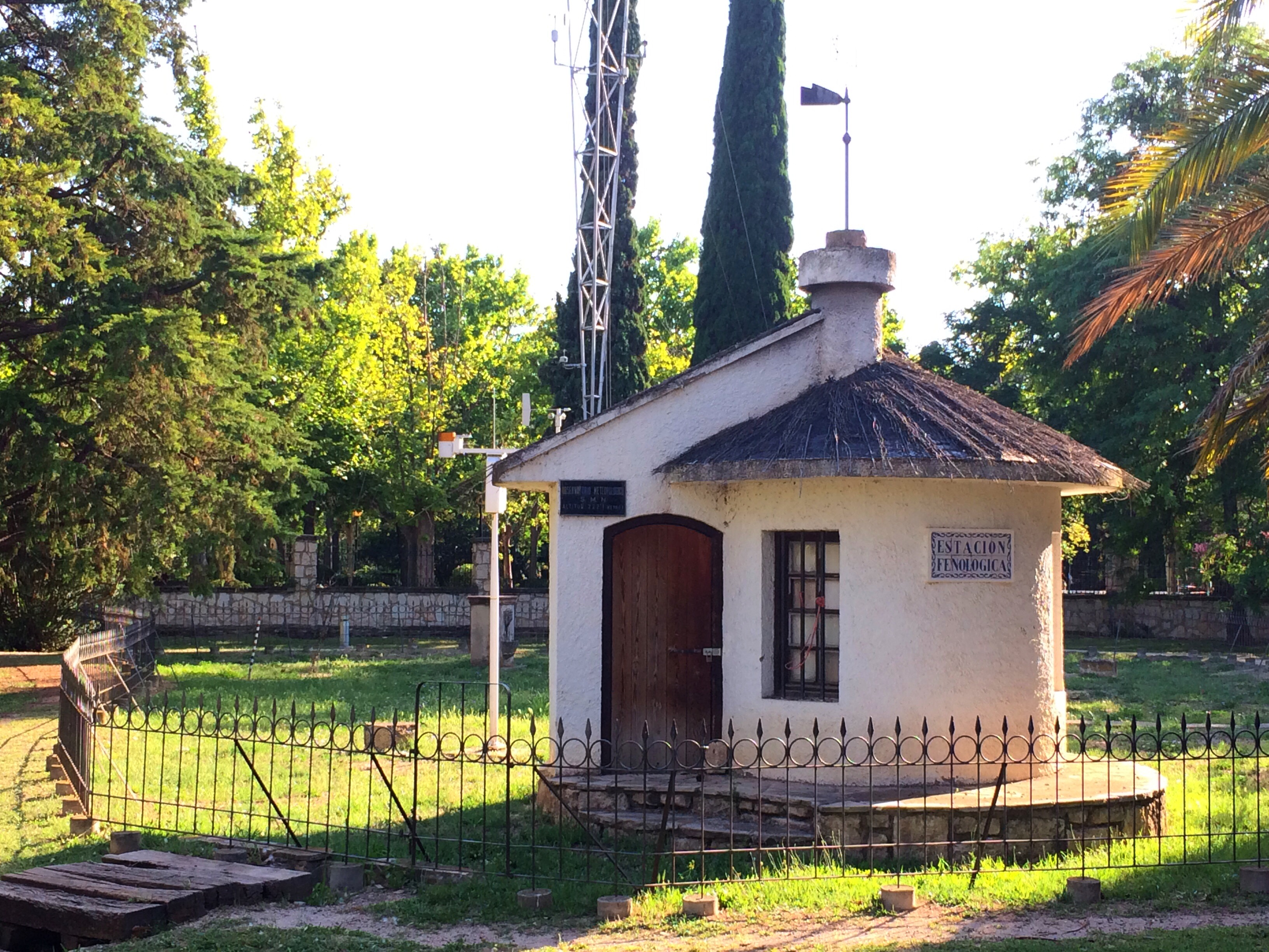 Estación Fenológica en el Jardín Botánico del Parque Grande (Zaragoza)